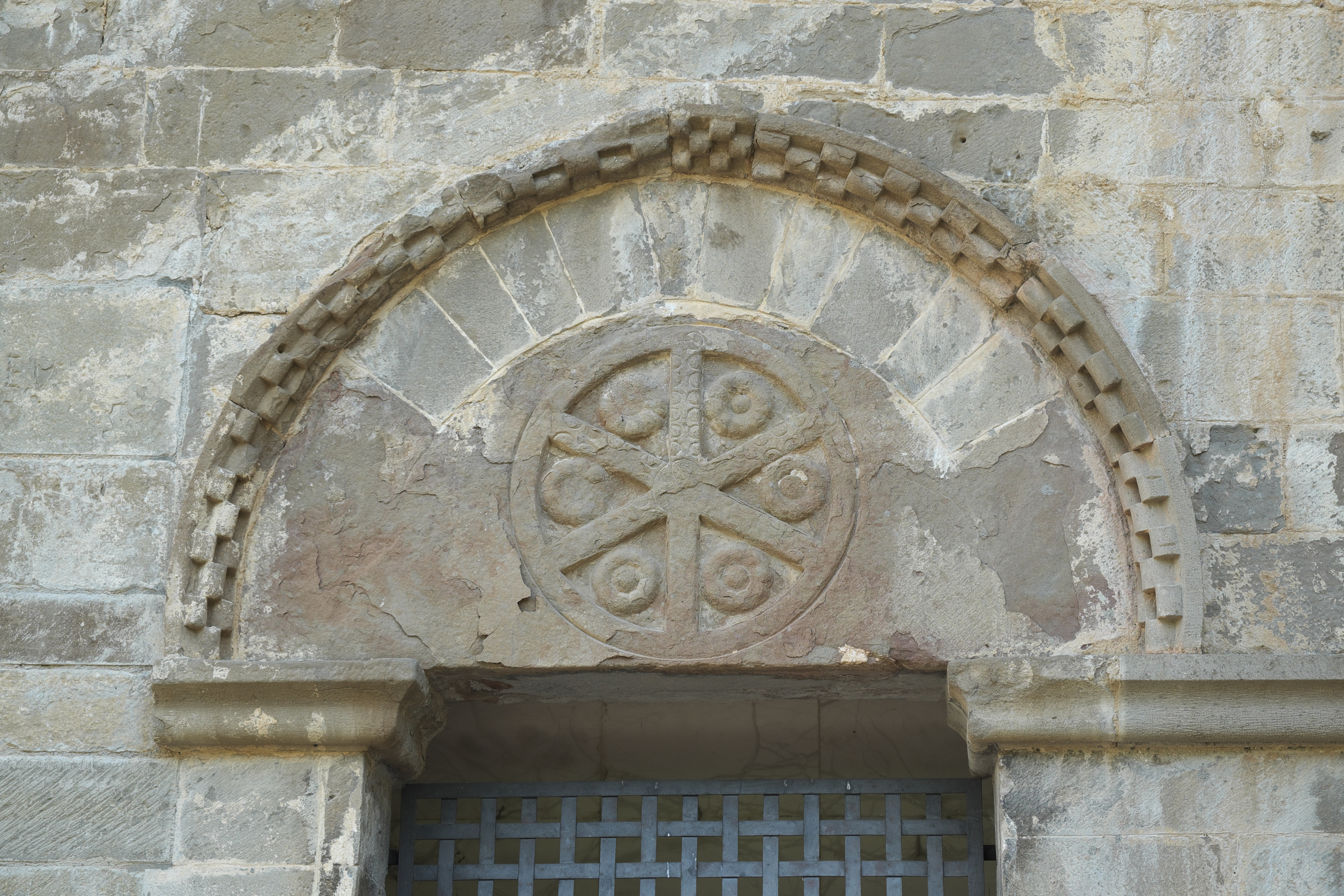 Pfarrkirche und ehemalige Klosterkirche Santa María in Santa Cruz de la Serós in der Provinz Huesca (Aragón/Spanien), Tympanon des Südportals